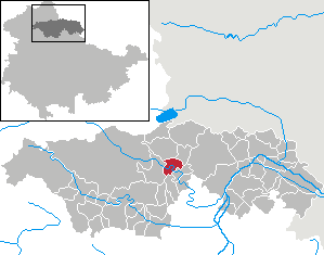 Göllingen in Thuringia - Kyffhäuserkreis